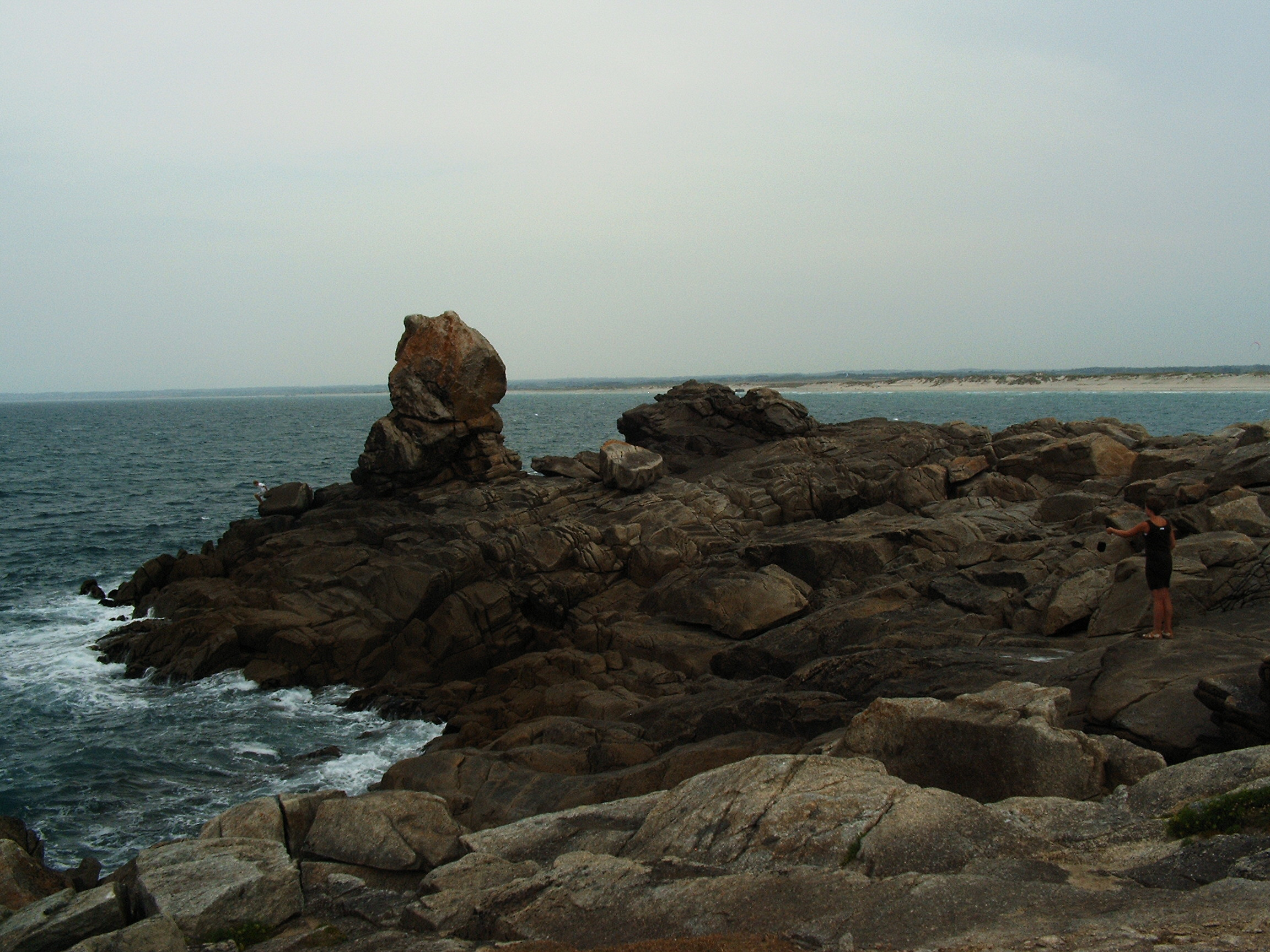 Felsformationen La Torche am Pointe de la Torche in der Bucht von Audierne, Finistere, Bretagne. Im Bildmittelpunkt die sog. Fackel, englisch TORCHE.